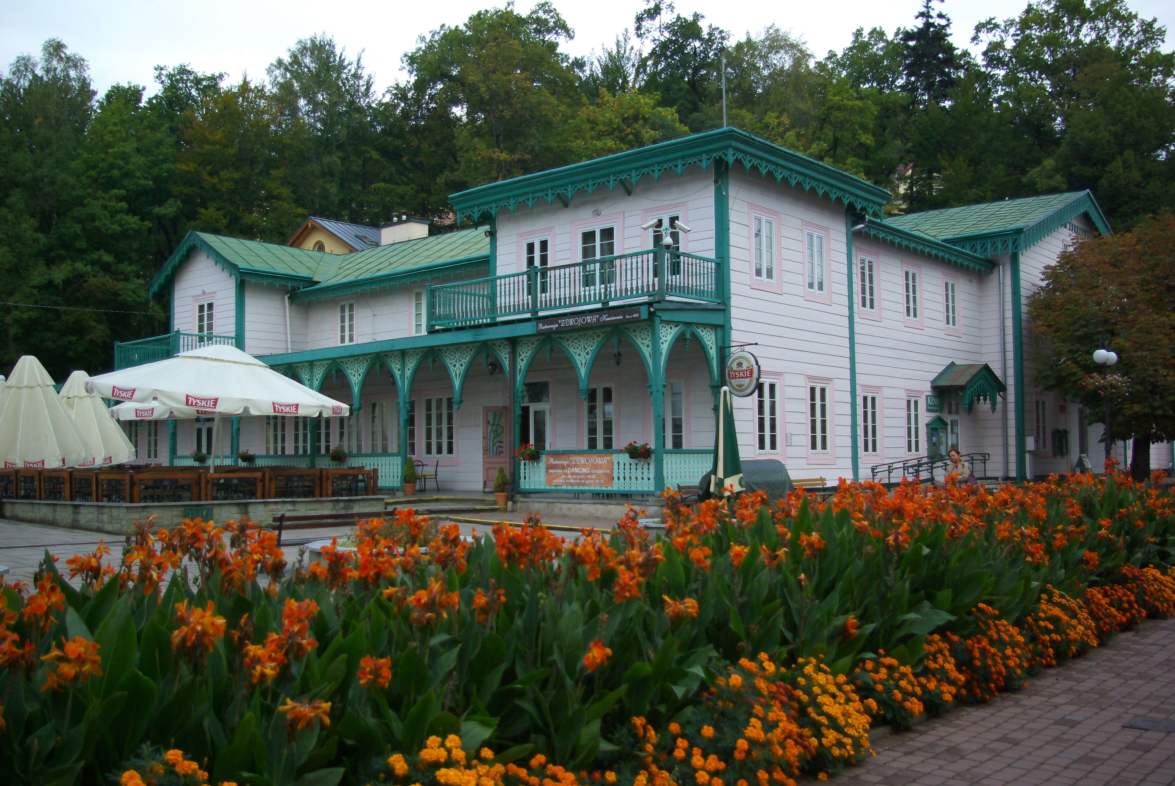 Dom Zdrojowy w Iwoniczu-Zdroju